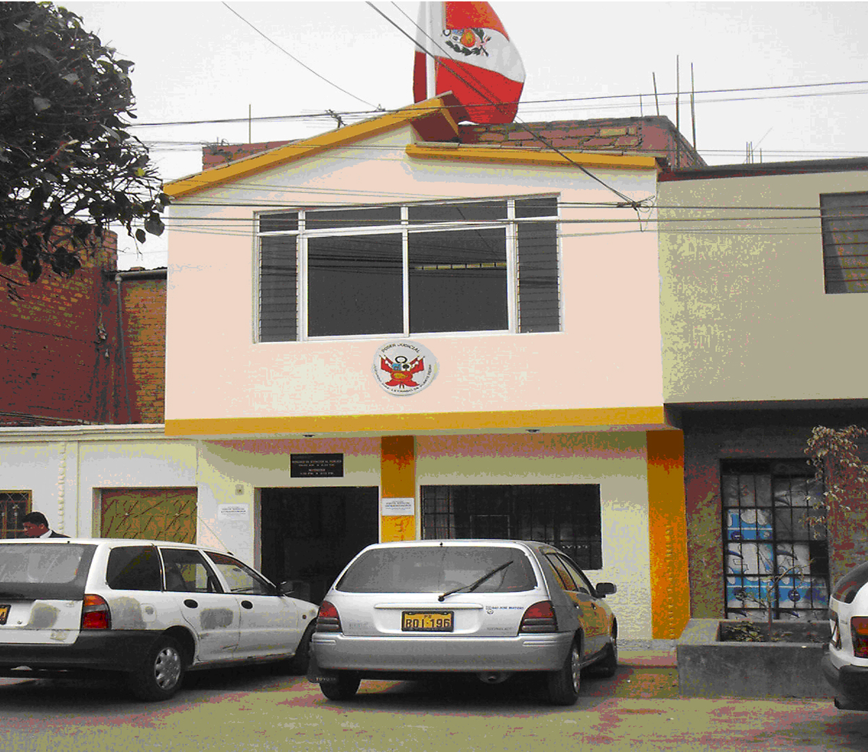 puente piedra